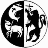 Logo de la communauté des Béatitudes